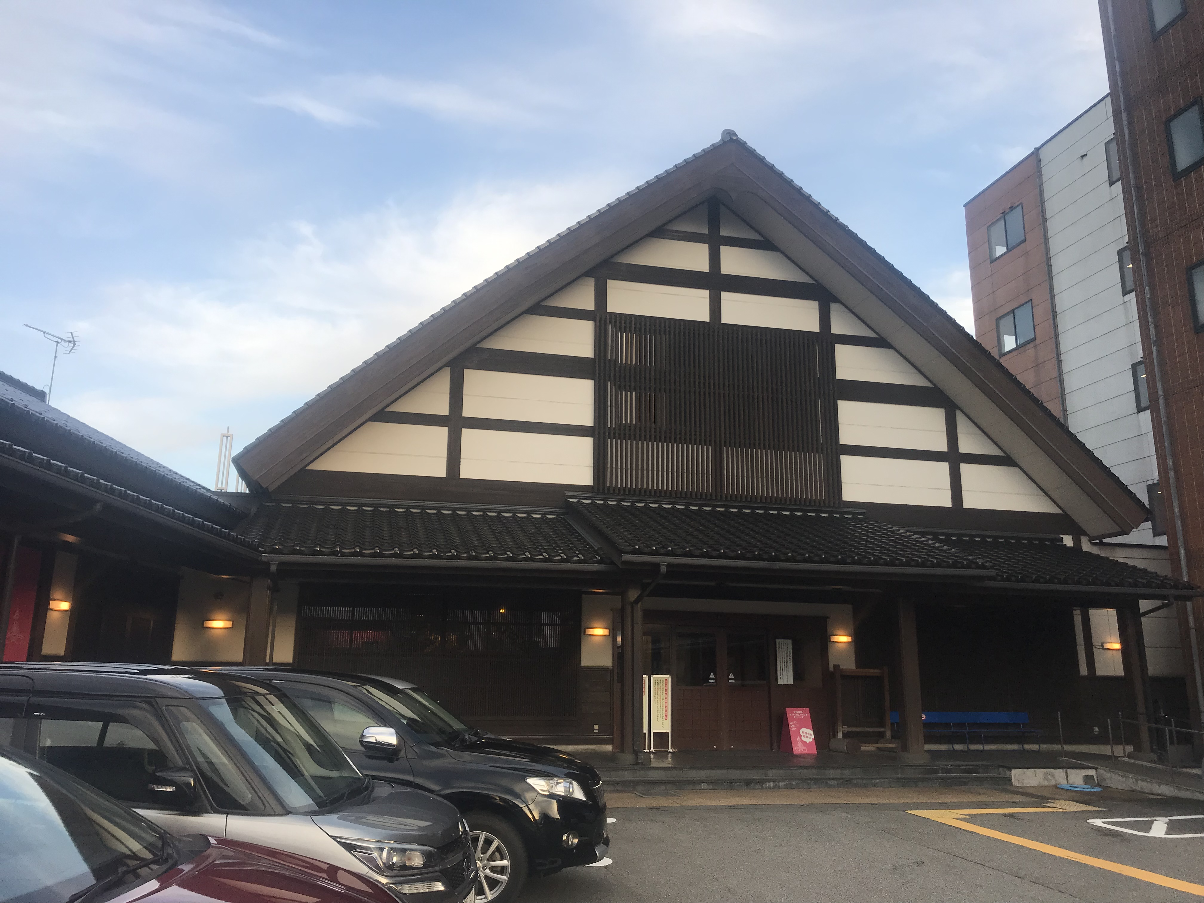 長八温泉です